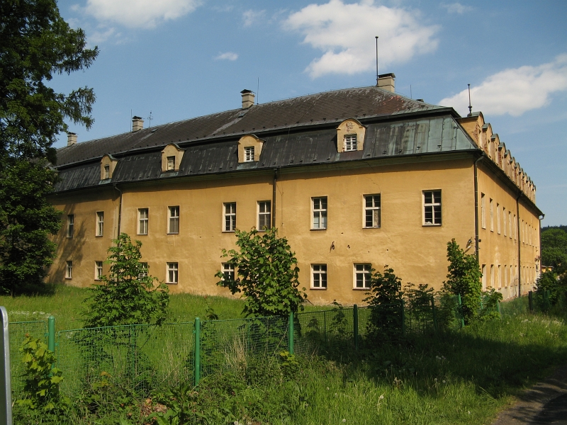 Zámek Hošťálkovy - zámecký areál, Hošťálkovy 26